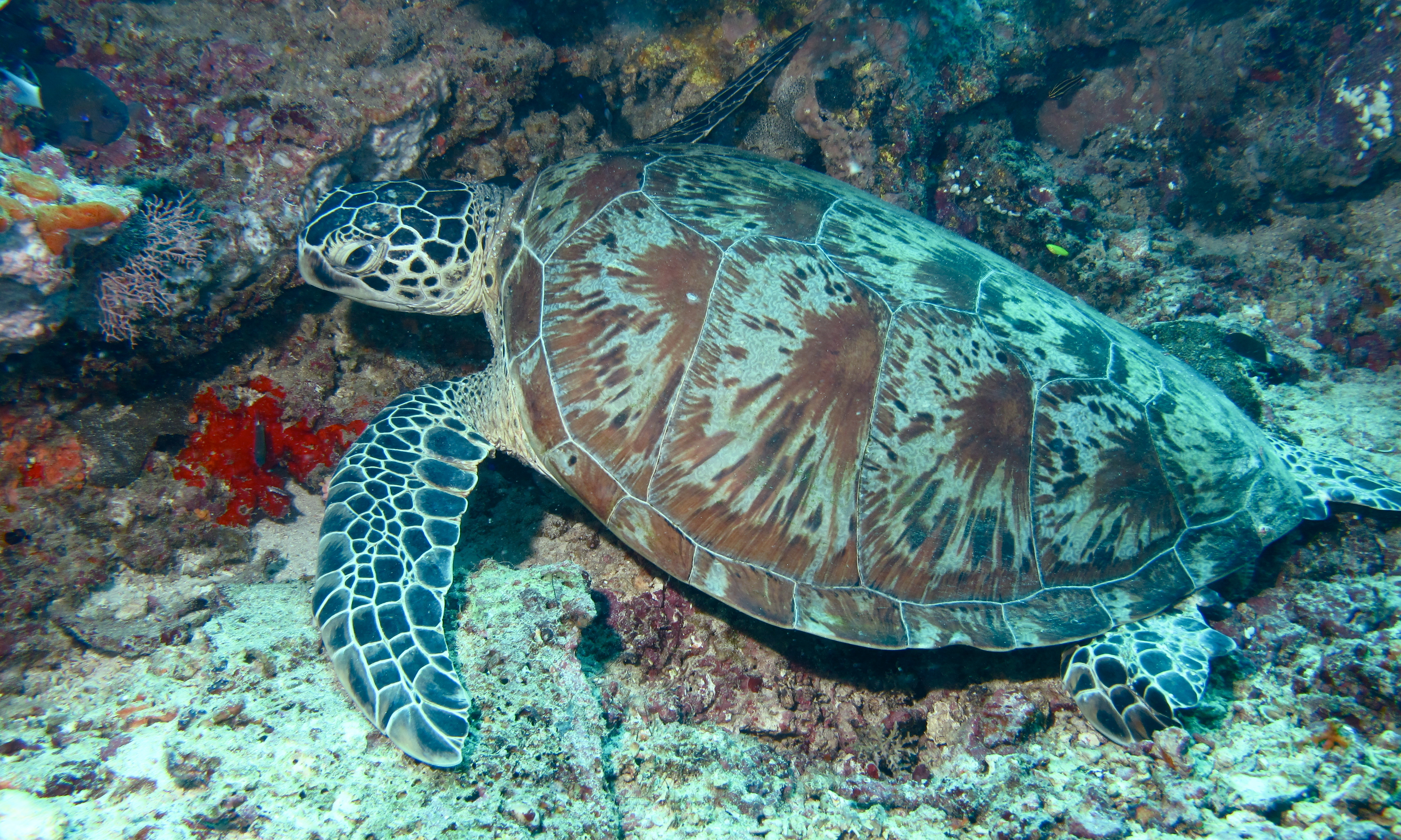 Barracuda Point, Sipadan, Sabah, MALAYSIA